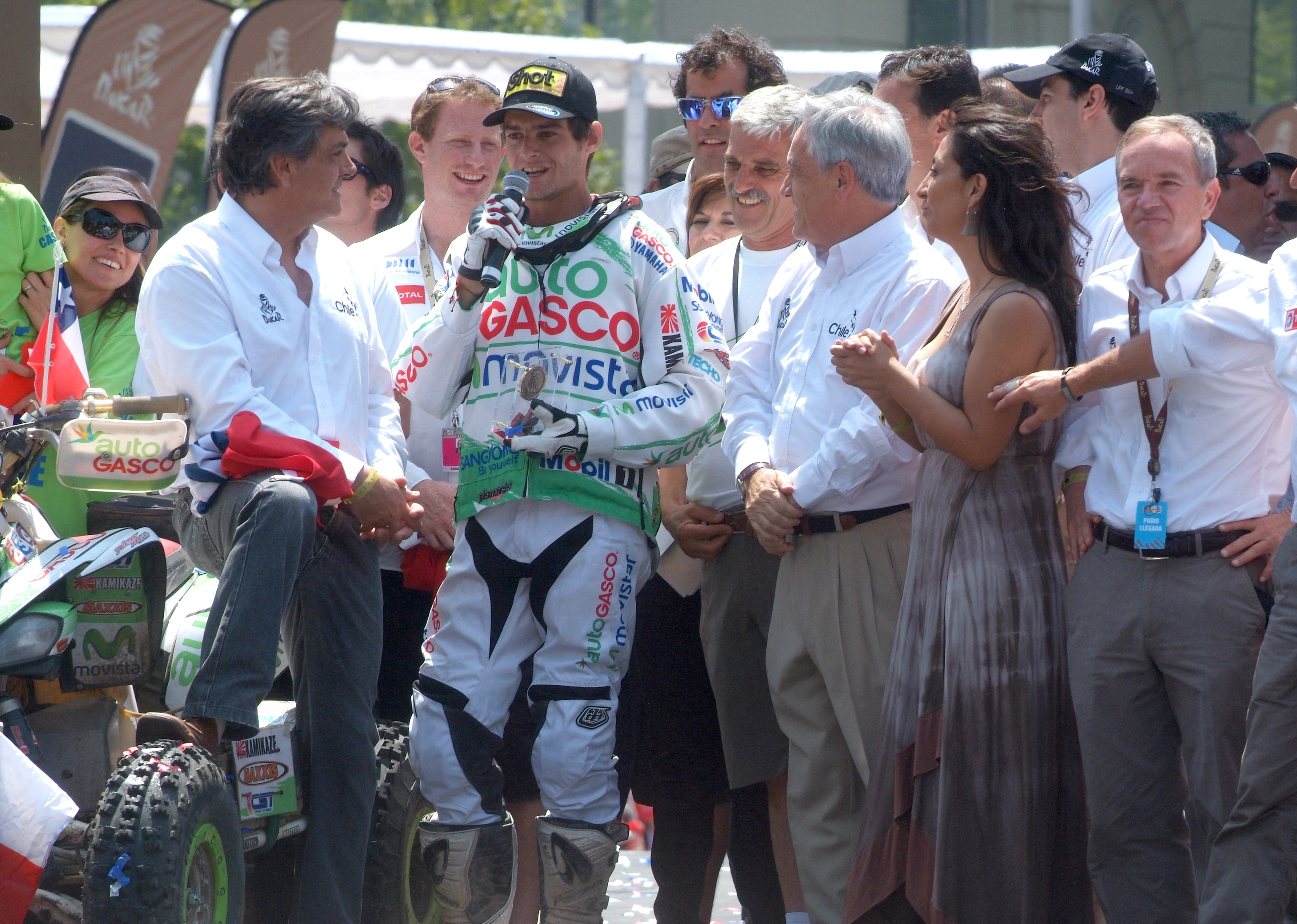 Premiación del Rally Dakar 2013